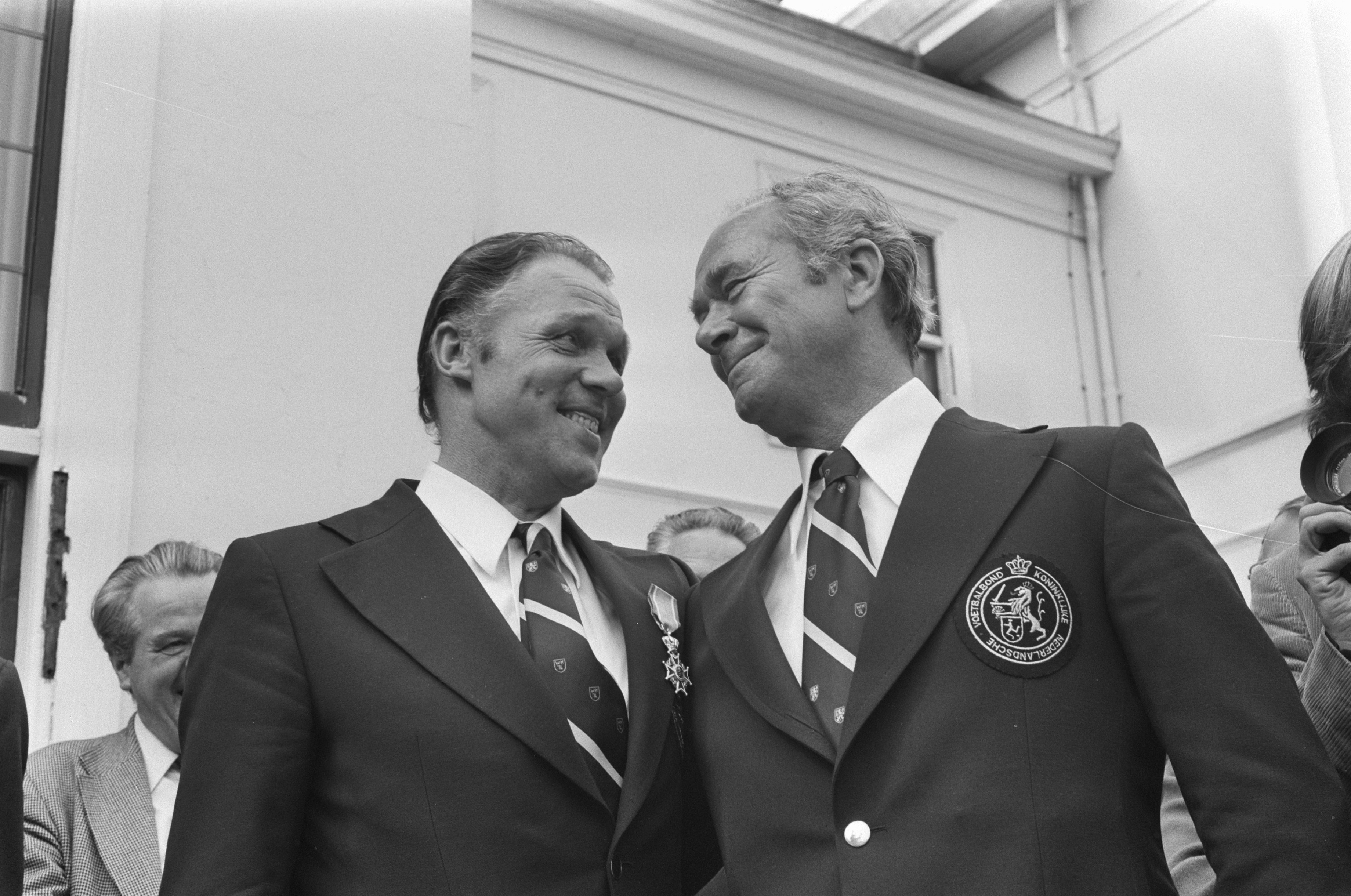 Collectie / Archief : Fotocollectie Anefo Reportage / Serie : [ onbekend ] Beschrijving : Den Uyl ontvangt Nederlands elftal op Catshuis; Michels Fadrhonc (r) (koppen) Datum : 8 juli 1974 Trefwoorden : elftallen, ontvangsten, sport, trainers, voetballers Persoonsnaam : Fadrhonc, František, Uyl, Joop den Fotograaf : Mieremet, Rob / Anefo Auteursrechthebbende : Nationaal Archief Materiaalsoort : Negatief (zwart/wit) Nummer archiefinventaris : bekijk toegang 2.24.01.05 Bestanddeelnummer : 927-3171